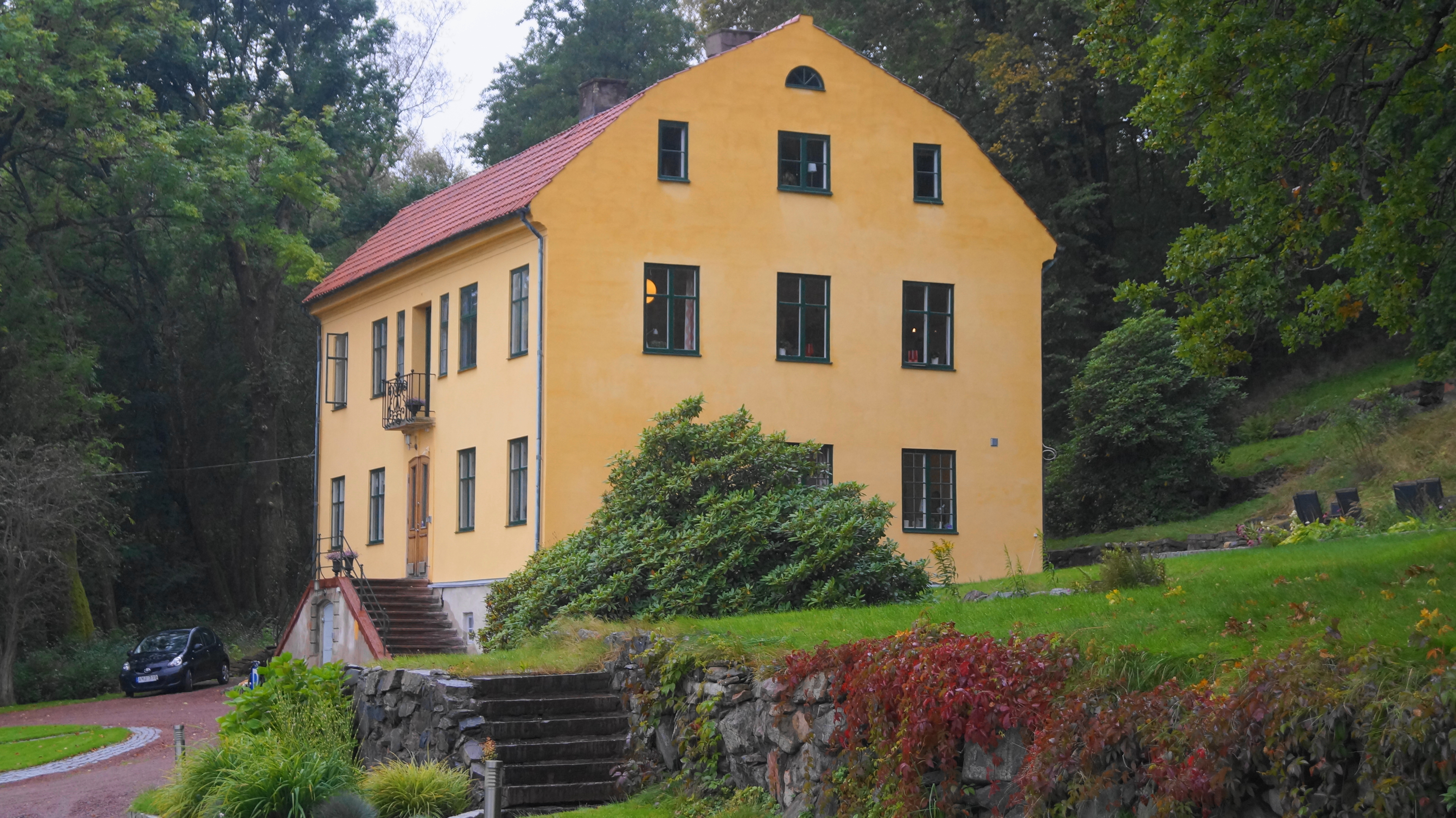 Bäckebol (Backa 766:594 f.d. stg 13817 Herrgård,Bruksherrgård (1 byggnad)